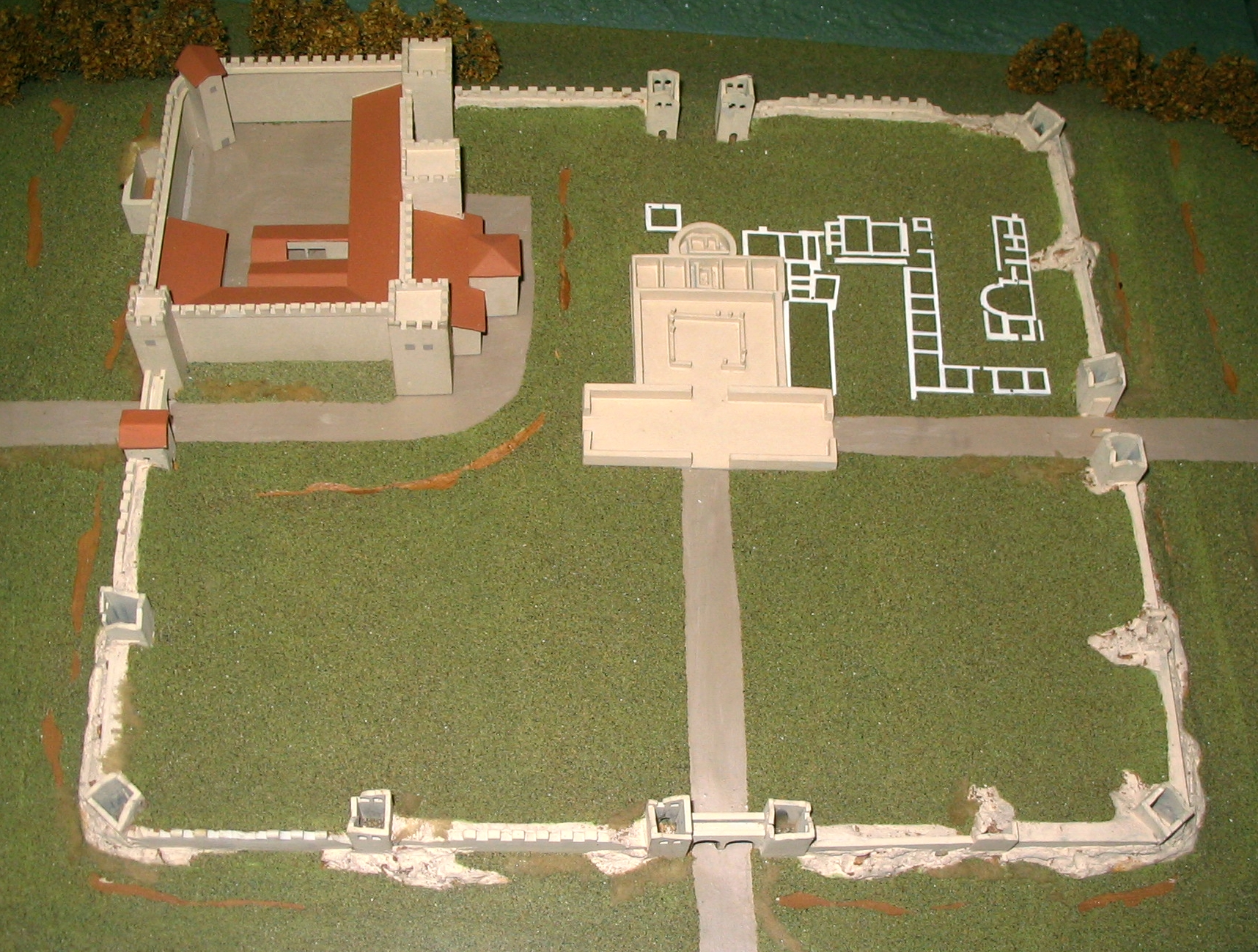 Das im archäologischen Museum der Stadt Kelheim, Niederbayern ausgestellte Modell des Kastell Eining